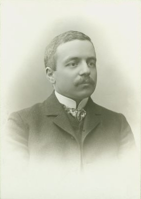 Karl Girgensohn, baltisaksa teoloog